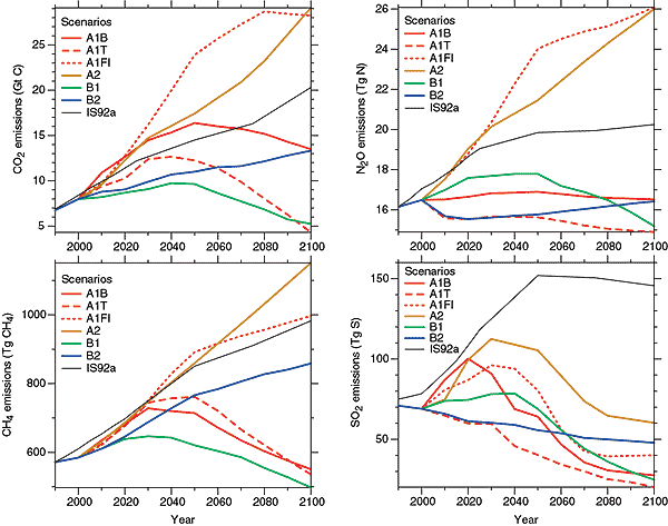 Српски (ћирилица): Предвиђене емисије неких гасова стаклене басте по ИПЦЦ сценаријима до краја 21. века